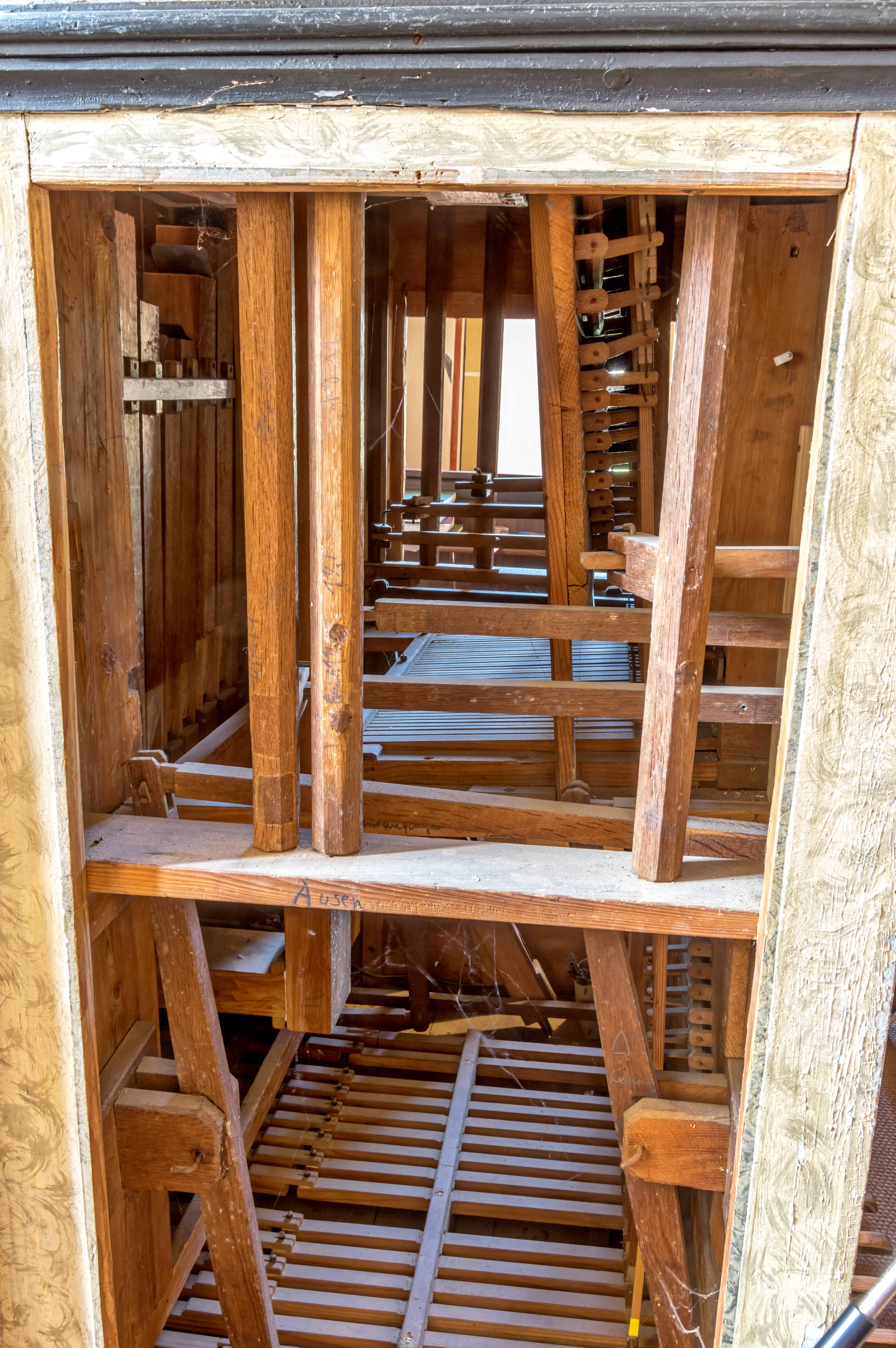 St. Aegidien in St. Ilgen einem Teilort von Laufen Die historische Orgel, mit Detailaufnahmen Das Innere der Orgel